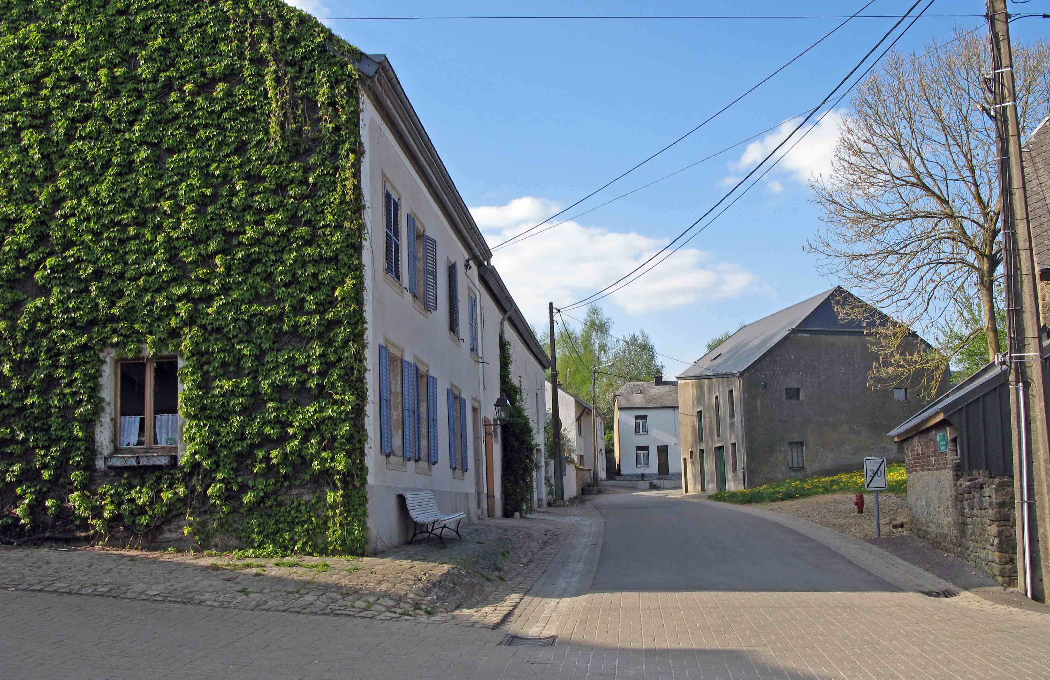 Une rue de Tontelange (Belgique).